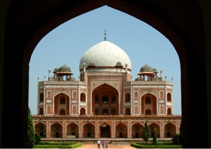 Source: Paulprescott72